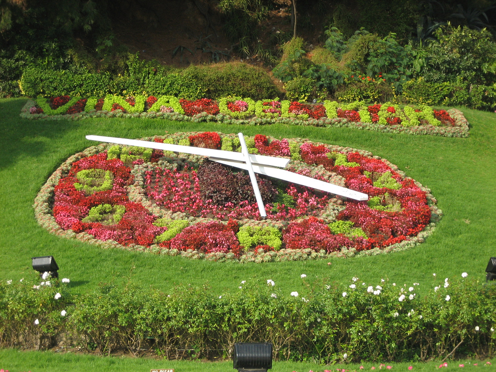 And it keeps time too!